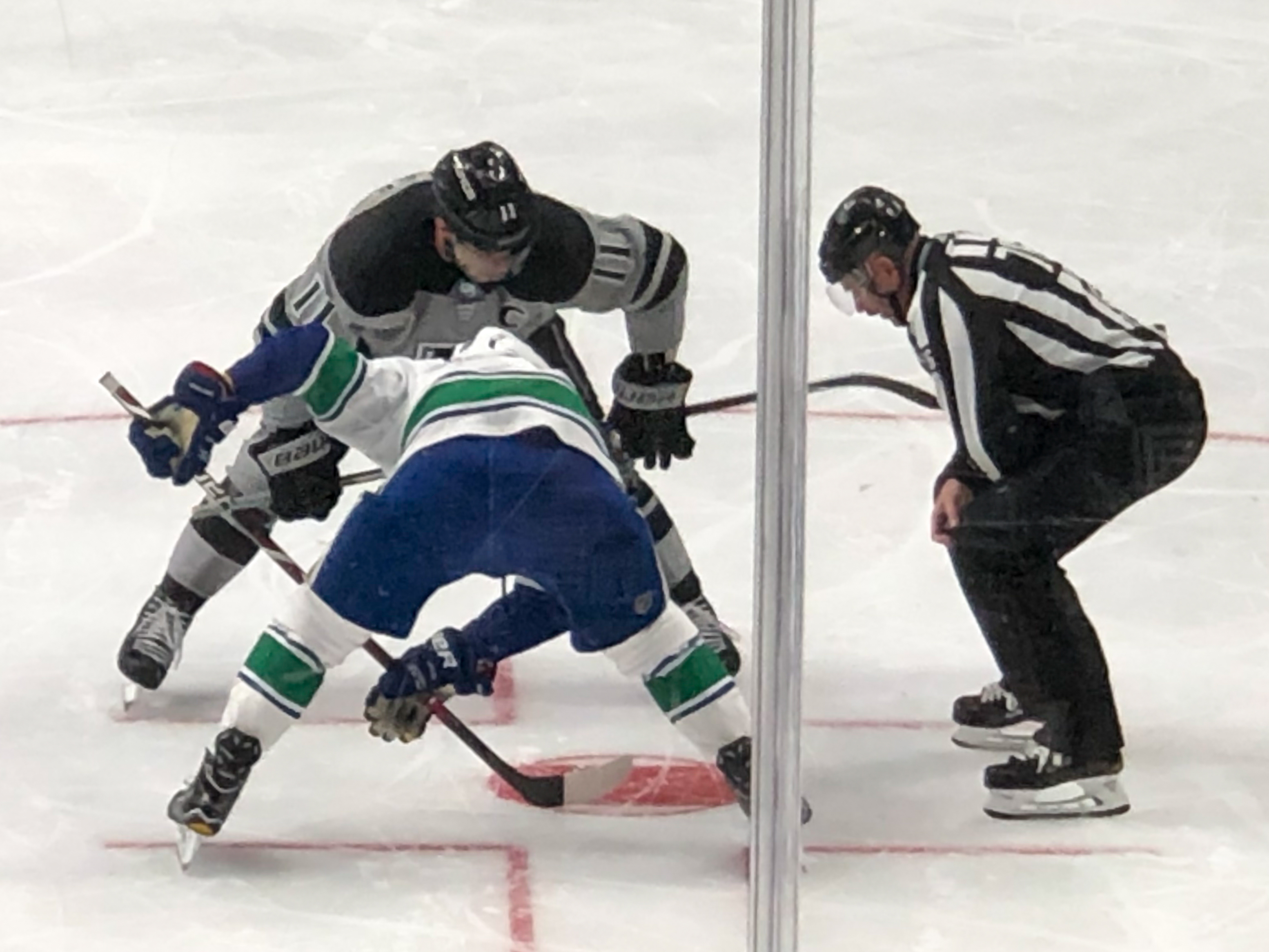 Anze Kopitar (Anže Kopitar) and Adam Gaudette